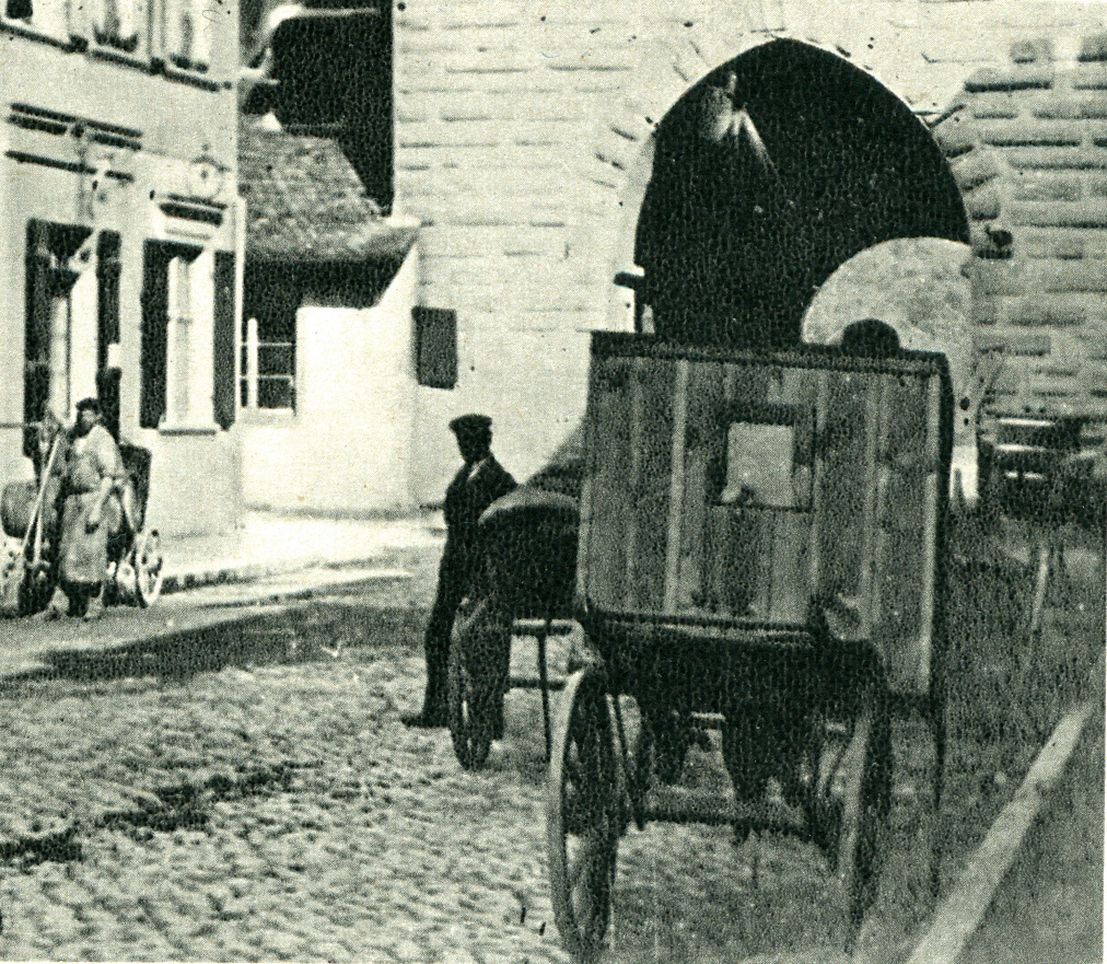 Jakob Höflingers fahrbare Dunkelkammer, wie sie in den Straßen Basels in den Jahren 1860-1875 zu sehen war. Die Platten wurden im Dunkel dieses Kastens erst kurz vor der Aufnahme gesilbert, das heißt lichtempfindlich gemacht, und mussten sofort verwendet werden. Unter dem Wagen sind die Beine des Präparators sichtbar, der gerade an der Arbeit ist. Ein zweiter Wagen führt Chemikalien, Geräte und Waschwasser mit. Der Meister benötigte zu seinen Freilichtaufnahmen drei Gehilfen. (Du, Januar 1945)